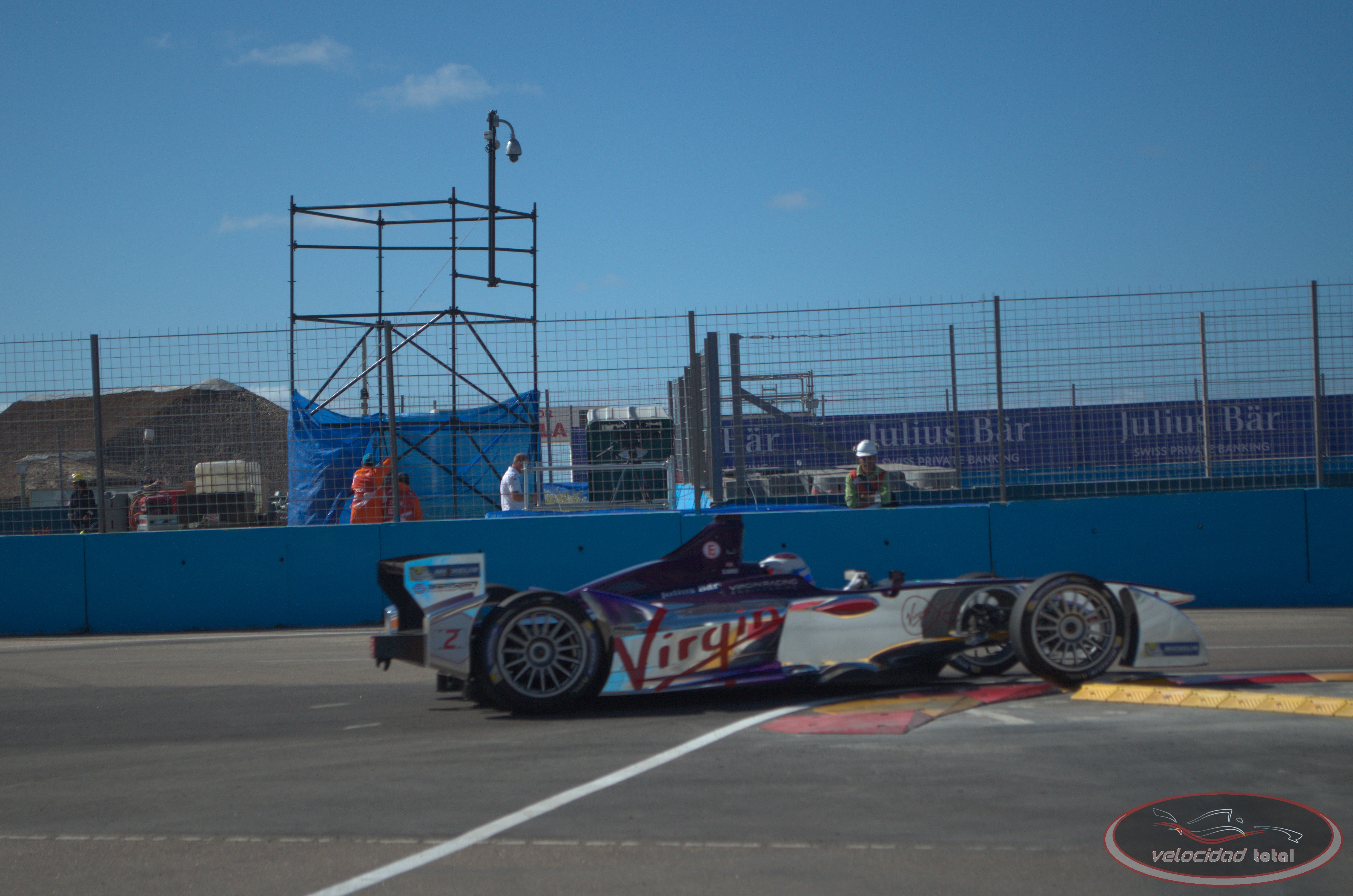 Solo se permite el uso de esta imagen mencionando a Velocidad Total como su autor. Imagen del equipo Virgin Racing de Fórmula E, durante el Punta del Este ePrix de 2014.